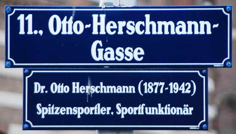 Straßenschild der Otto-Herschmann-Gasse im 11. Wiener Gemeindebezirk